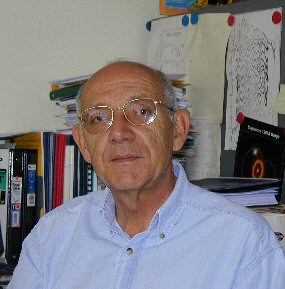 Patrice Bouchet